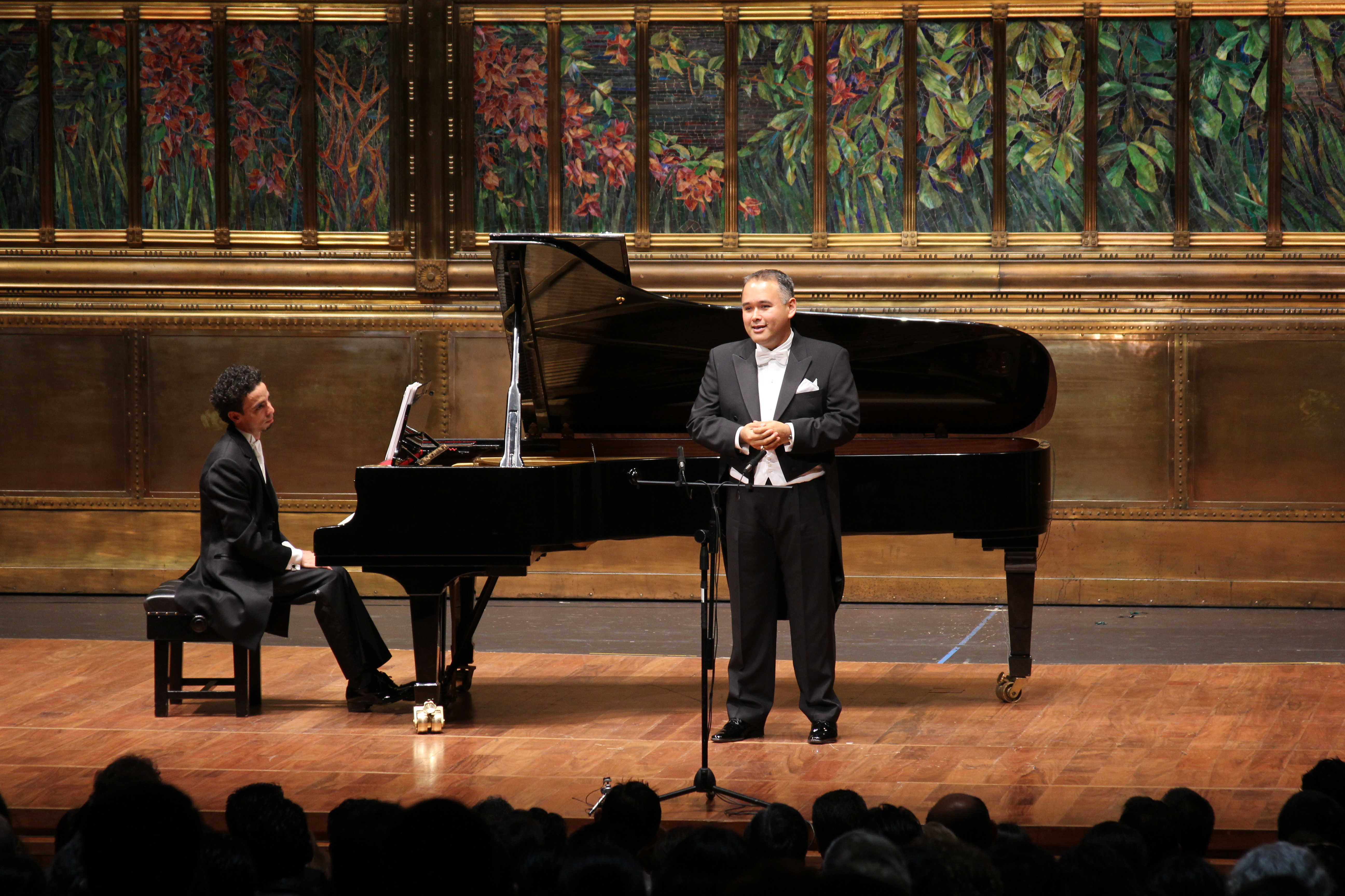 RECITAL Javier Camarena, tenor, Ángel Rodríguez, piano, Palacio de Bellas Artes, México, 2011